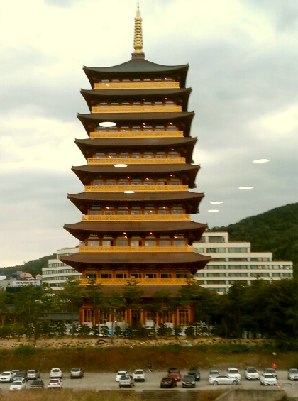 황룡사 구층 목탑 (보문단지 내 중도 연수원)